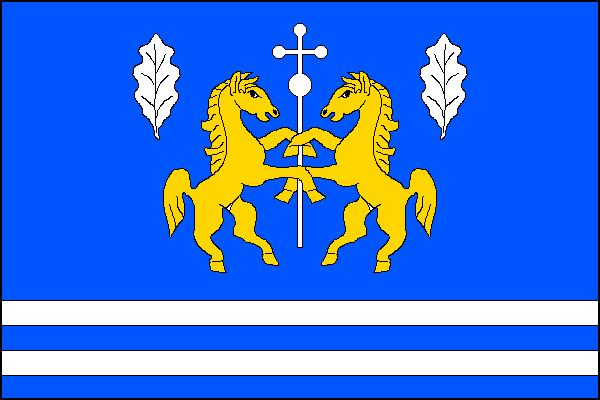 Vlajka obce Rychnovek